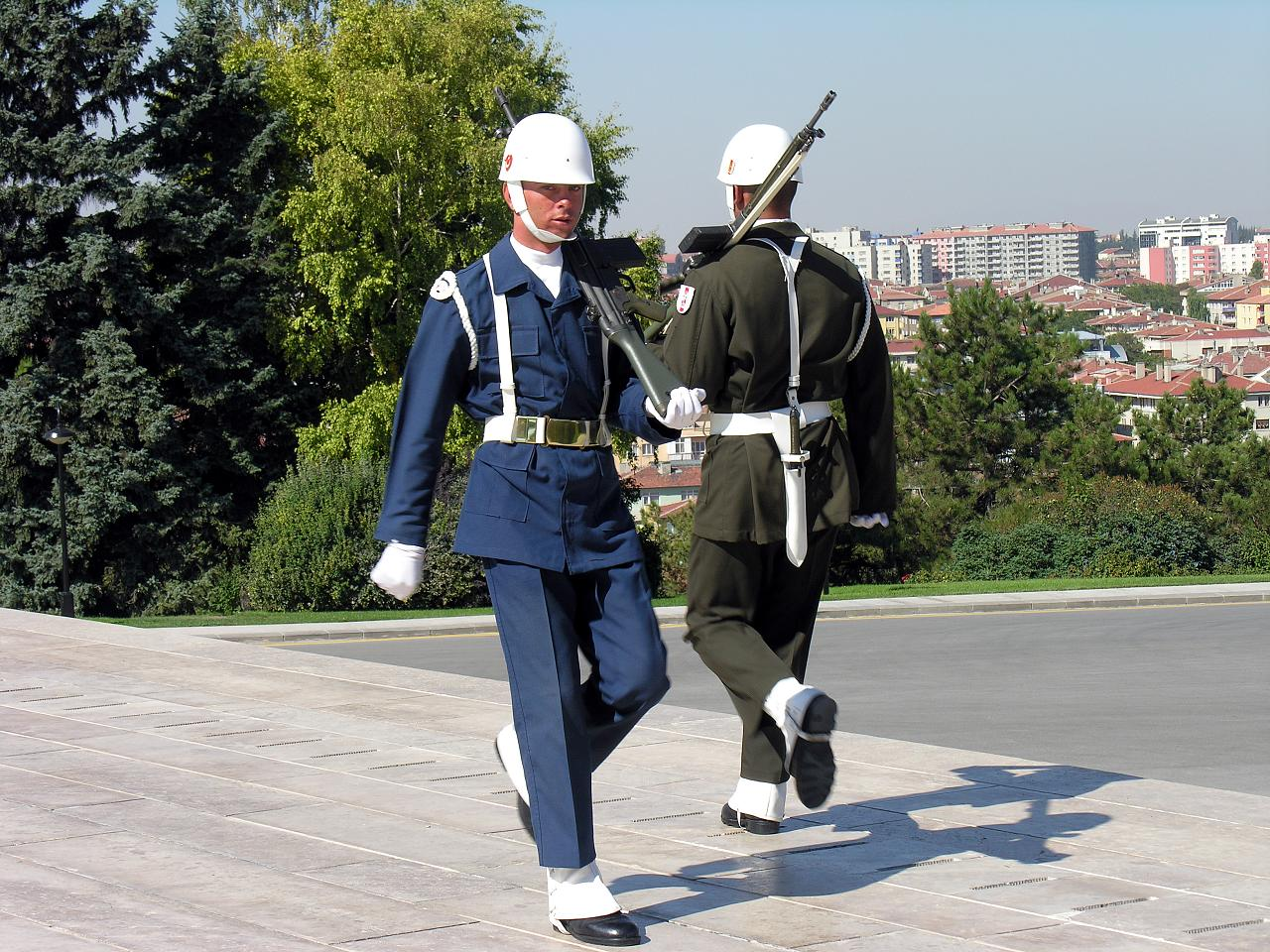 Anıtkabir